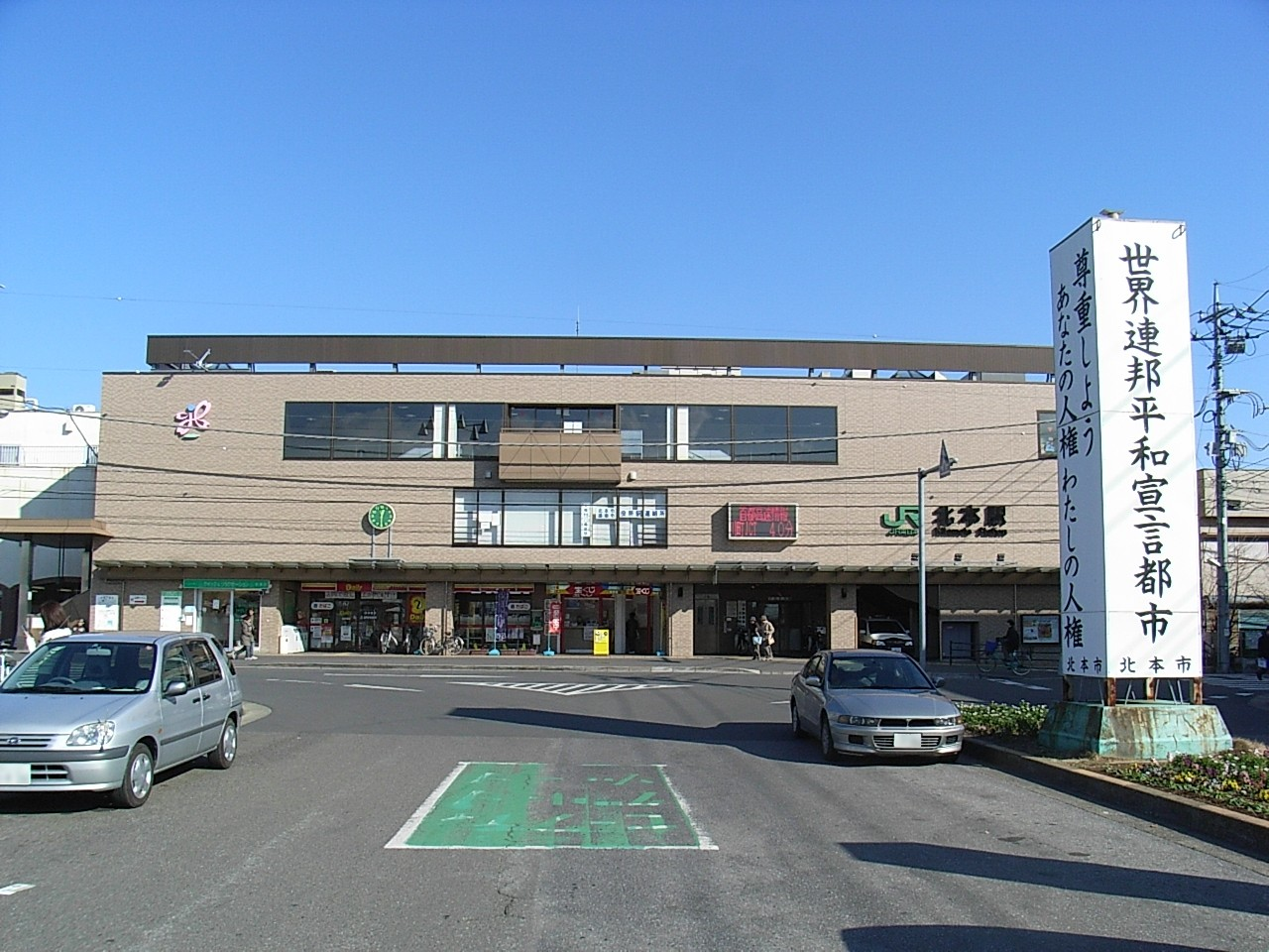 Kitamoto Station (West Entrance) on JR Takasaki Line. (1-12,Kitamoto,Kitamoto-shi,Saitama-ken,JAPAN)